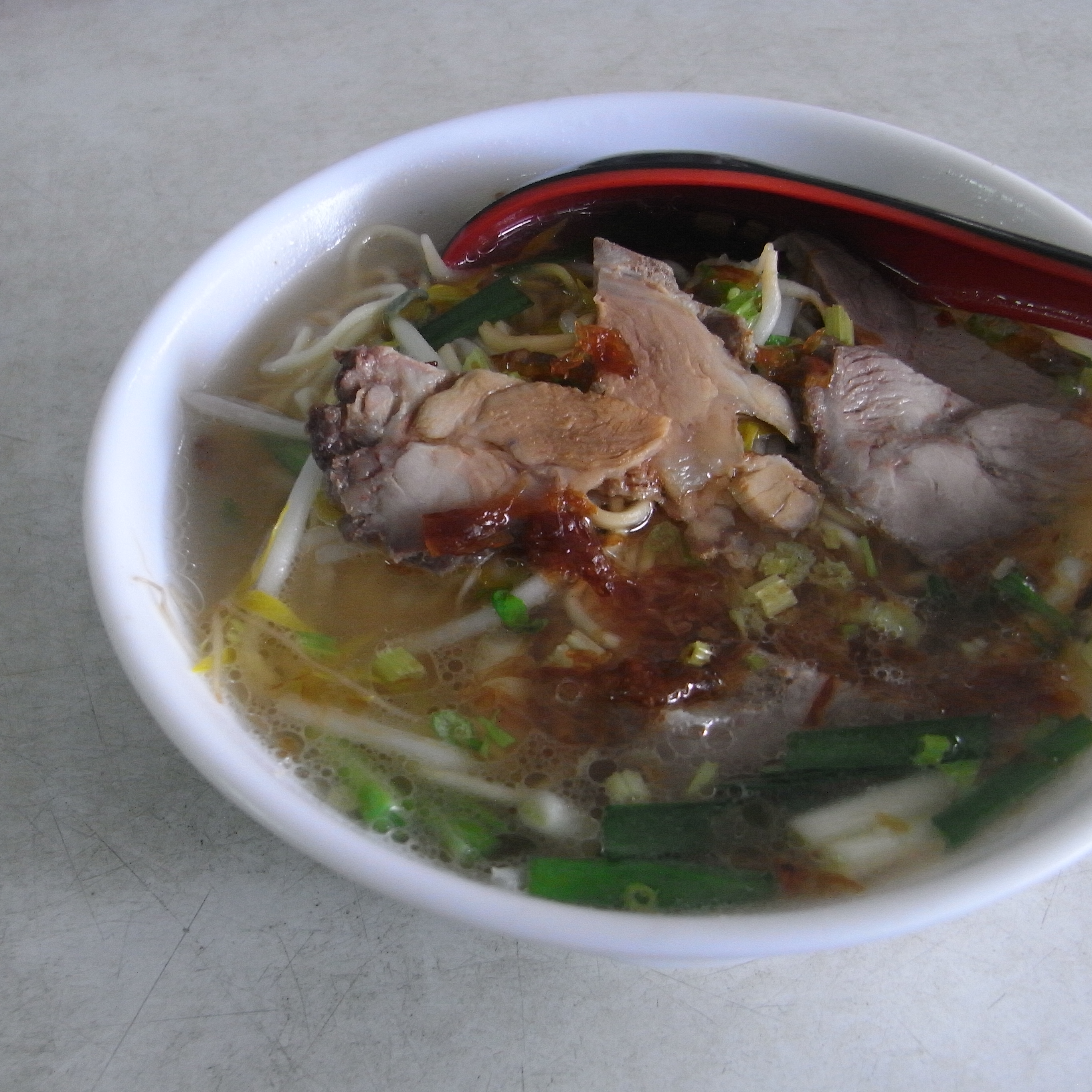 中文（台灣）: 玉里麵有分乾麵、湯麵二種口味，此為湯麵。